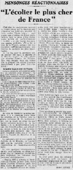 Extrait du journal Le Populaire n° 2133 du 7 décembre 1928 à propos de "L'écolier le plus cher de France", polémique à propos de l'école publique de Saint-Jean-sur-Vilaine